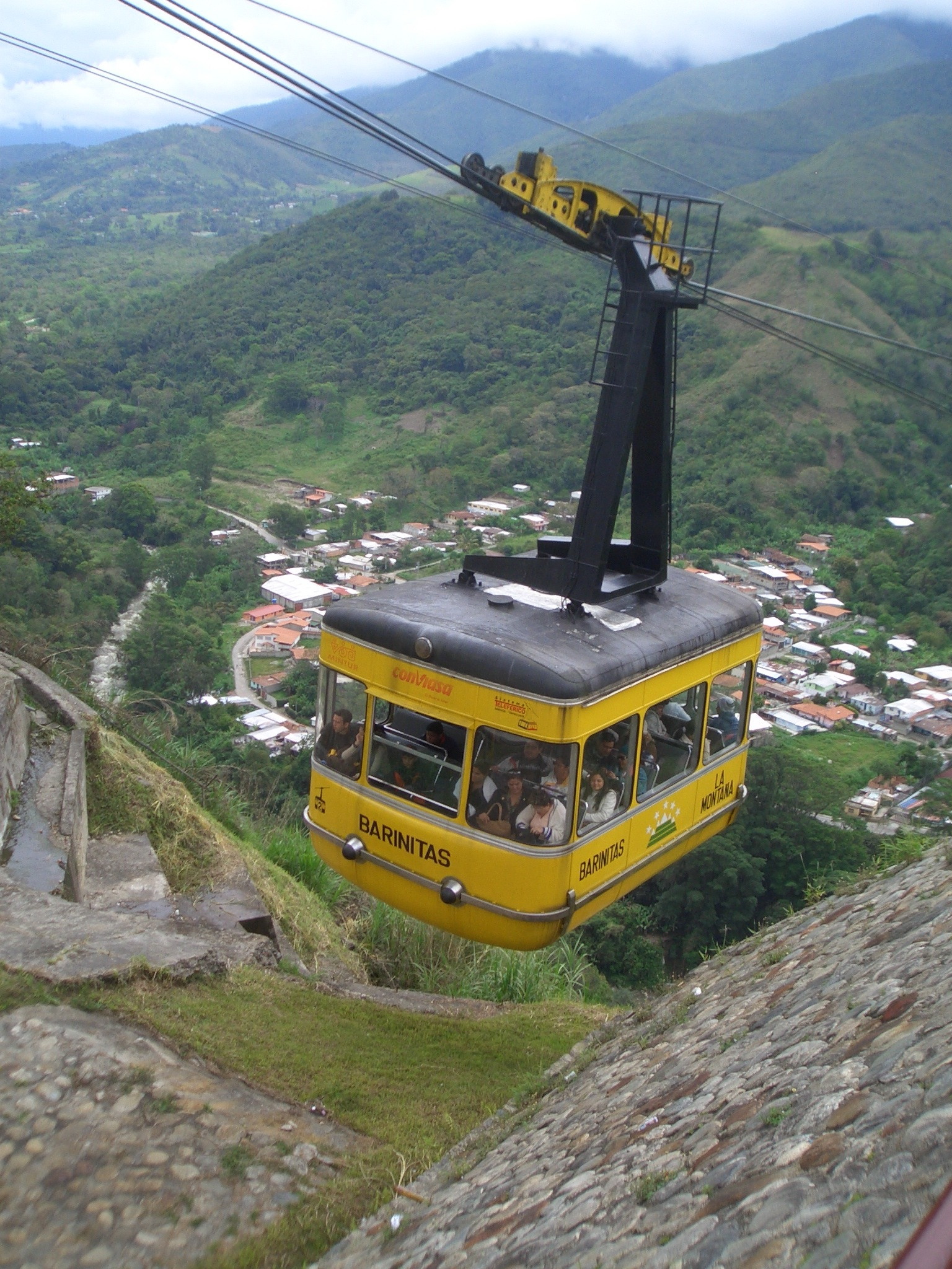 El teleferico mas alto del mundo : va desde Merida hasta el Pico Bolivar